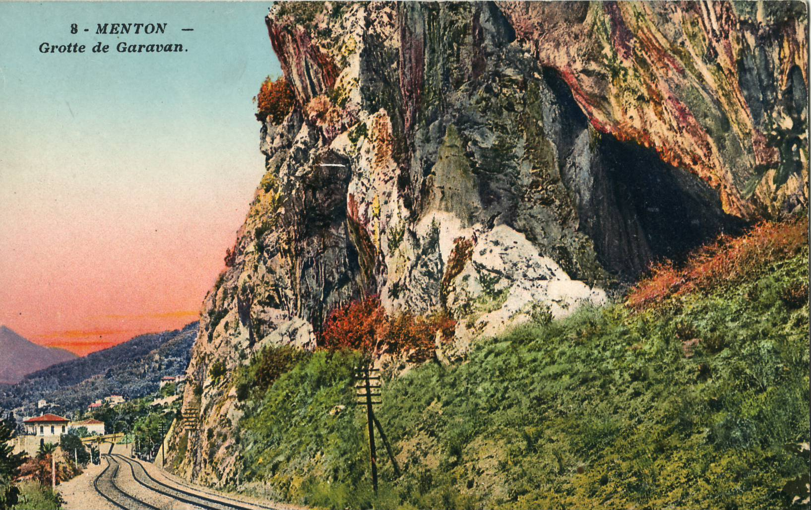 Carte postale ancienne éditée par Lemaitre, n°8 : MENTON - Grotte de Caravan